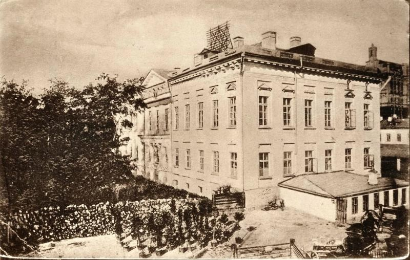 Москва. Ул. Б.Лубянка. 3-я Московская Гимназия. Начало XX века. На месте здания был выстроен дом "Динамо"